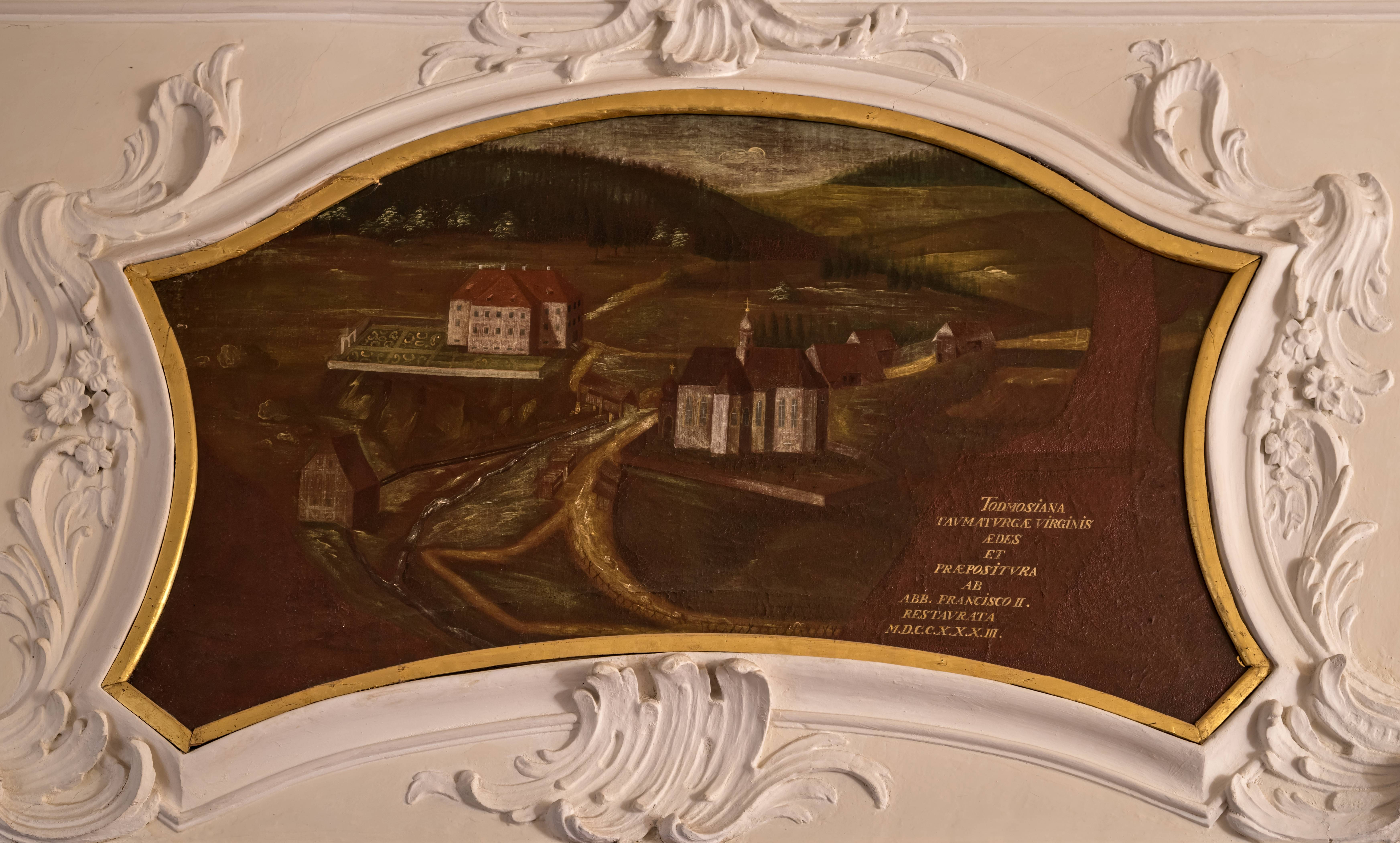 Bilder aus dem Schloß Bürgeln Hier Bilder von den Supraporten im ersten Stock des Schloßes. Es sind Bilder der Probsteien des Kloster St. Blasien und einige Füllbilder in einem später erstellten Flügel TODMOSIANA TAVMATVRGAE VIRGINIS AEDES ET PRAEPOSITURA AB ABB. FRANCISCO RESTAVRATA M.D.C.C.X.X.X.III.